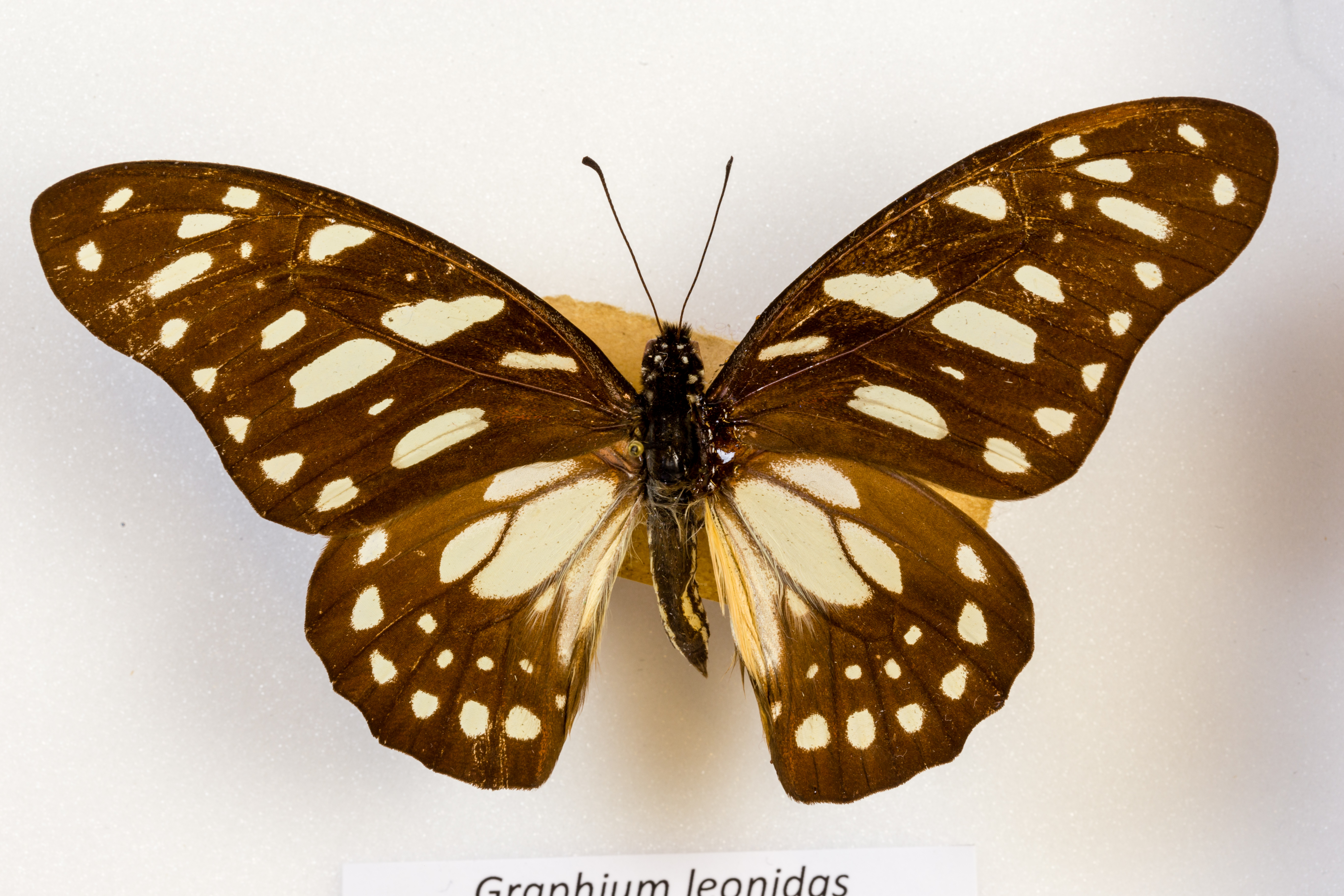 Face dorsale.